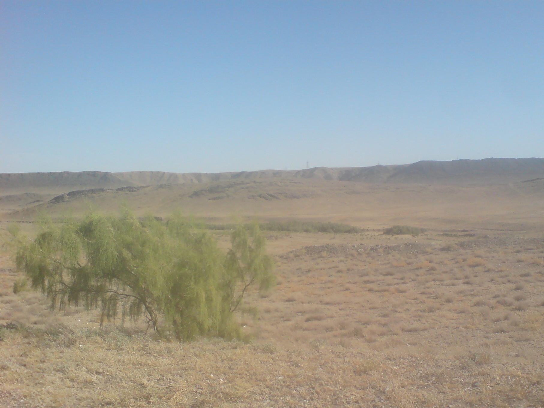 Горы Тамдытау в пустыне Кызылкум. На переднем плане - саксаул.